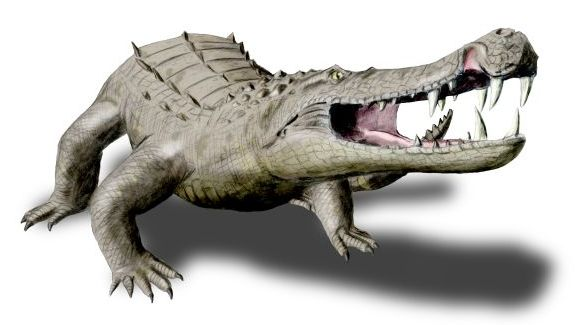 Kaprosuchus.